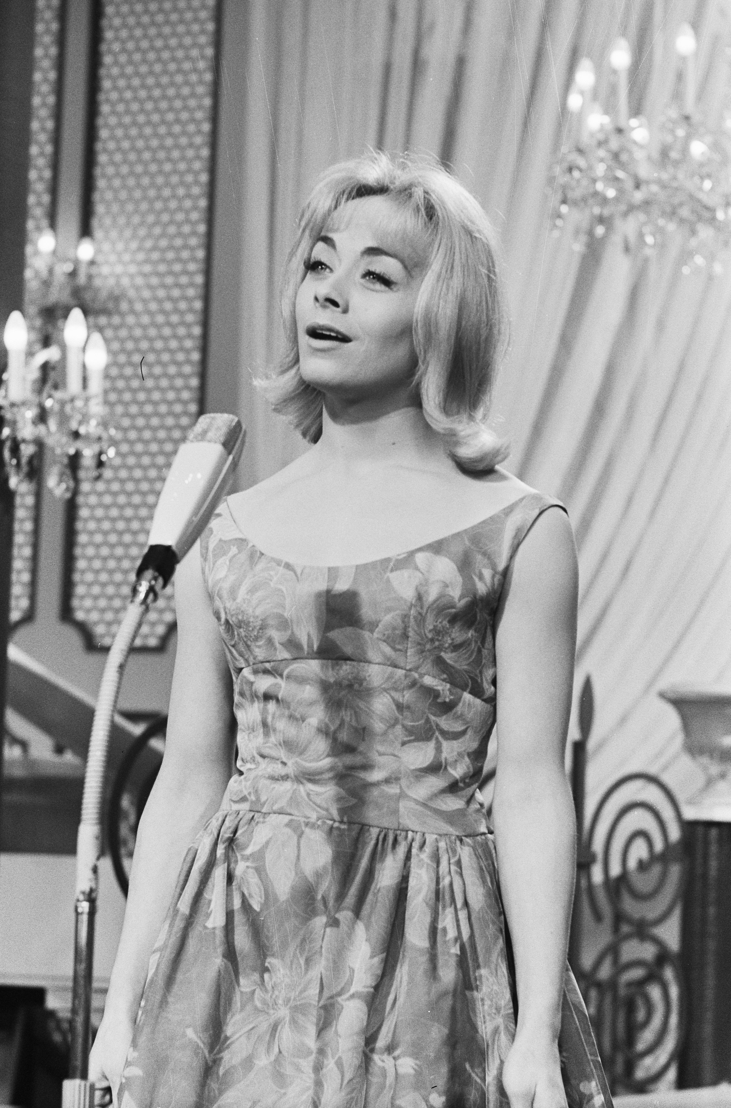 La chanteuse française Isabelle Aubret lors du concours Eurovision de la chanson, le 18 mars 1962.